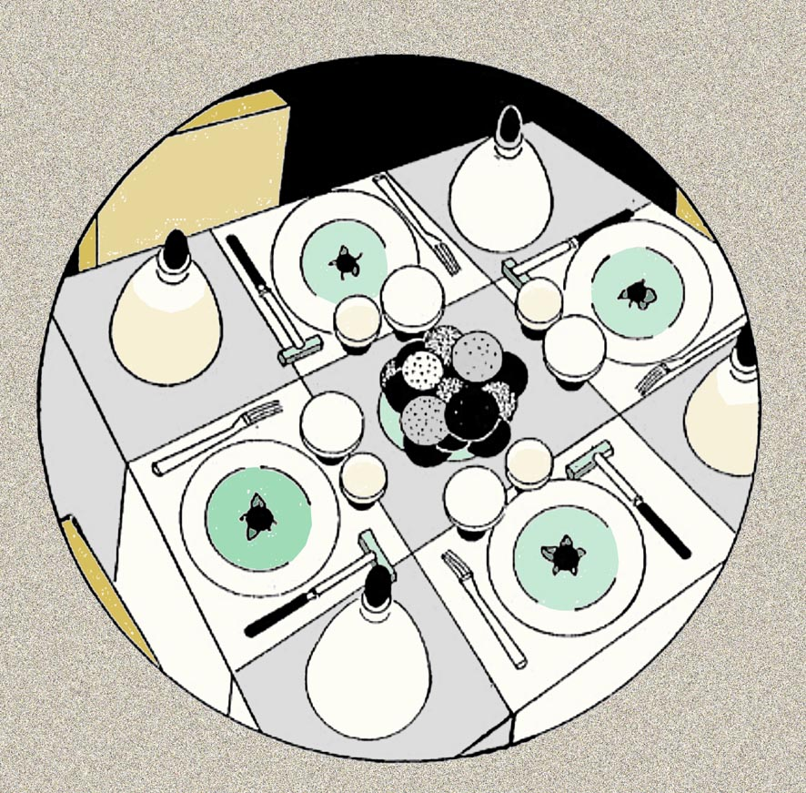 il y a peu d'iconographie sur Austin de Croze, celle la situe bien l'époque